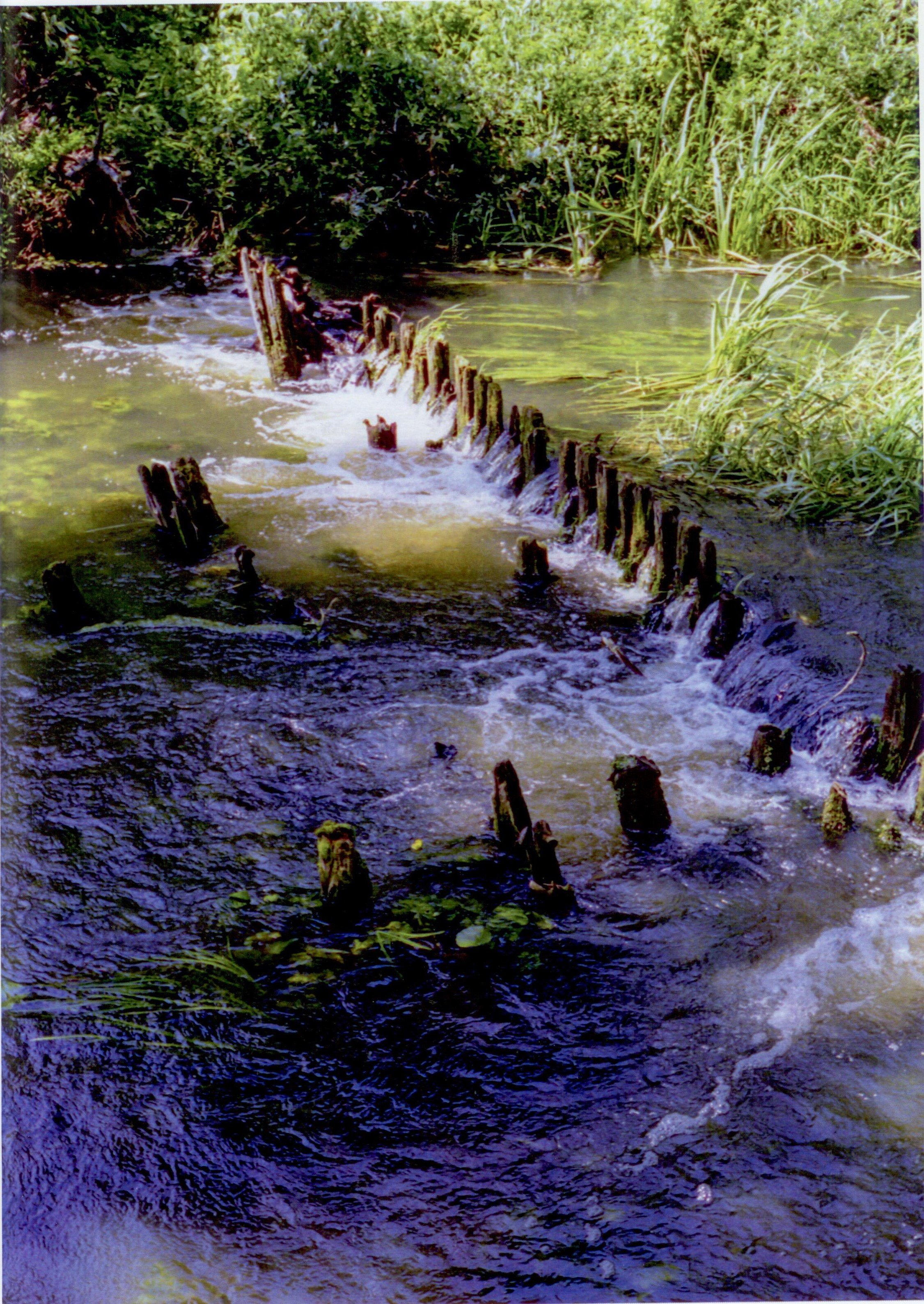 E. L. Pierzynska-Jelska,Uroczysko. Impresja III, fotografia, 1995